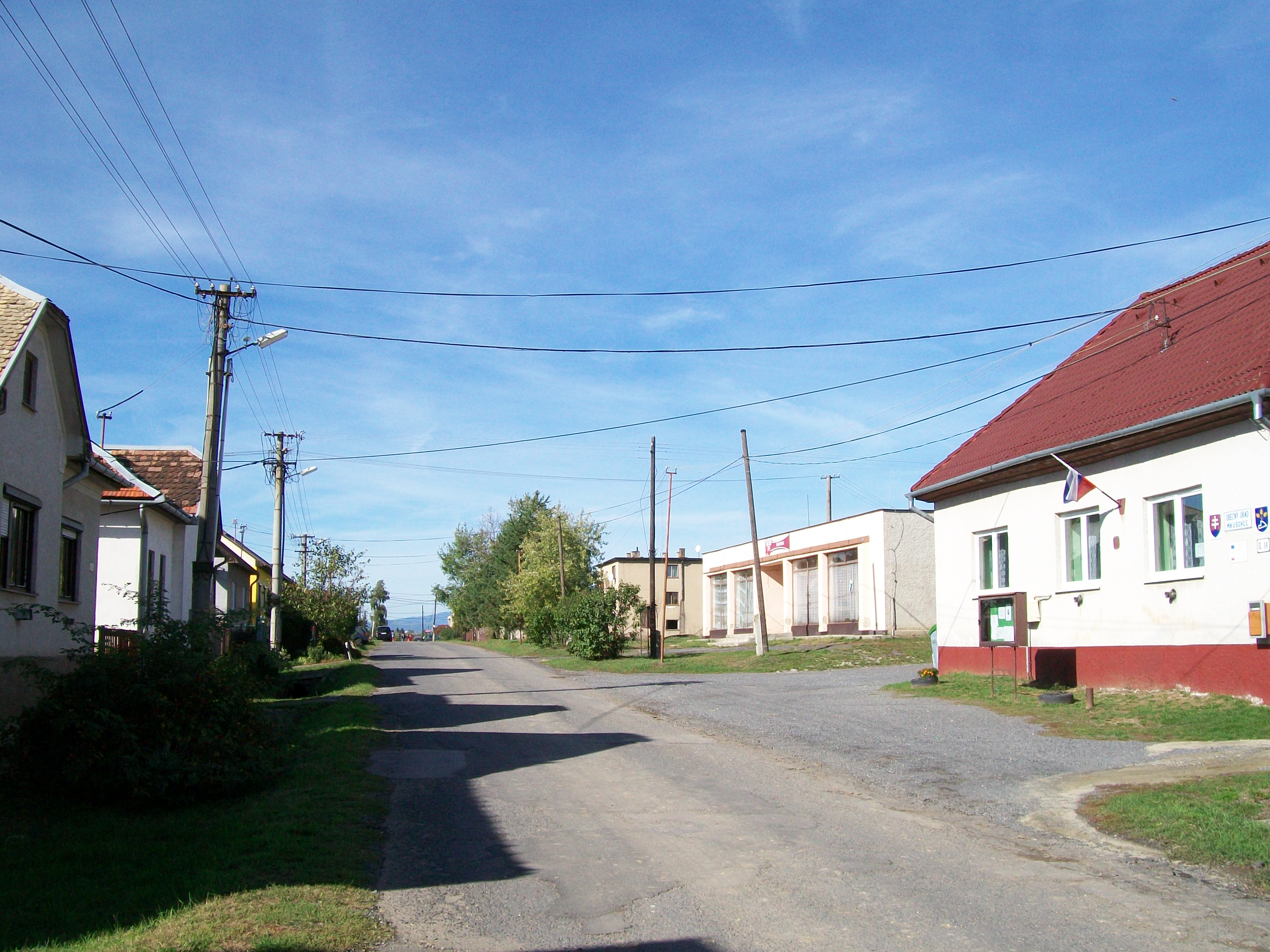 Ulica v Mikušovciach, vpravo obecný úrad